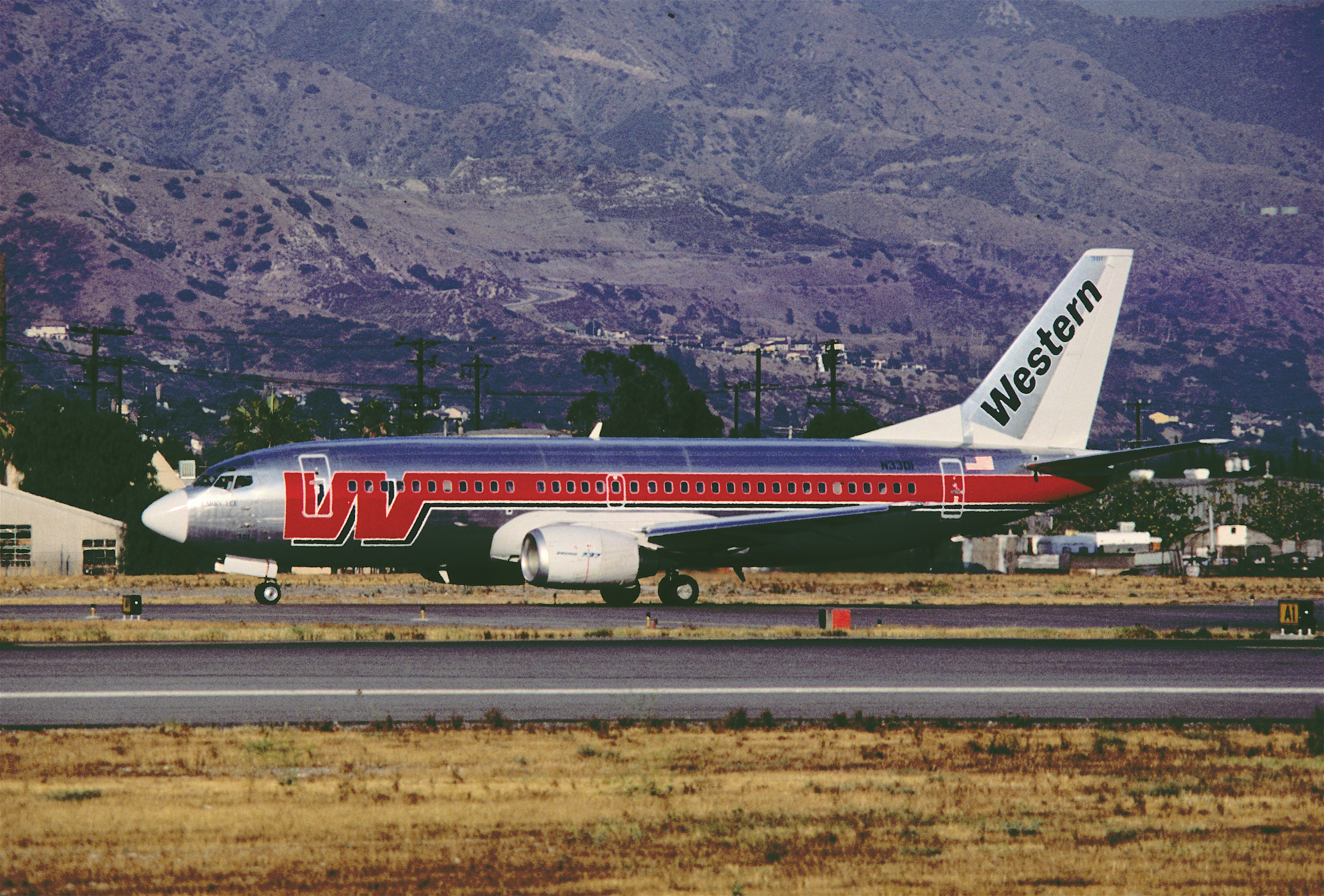 Western Airlines Boeing 737-347; N3301,June 1985/ CWE